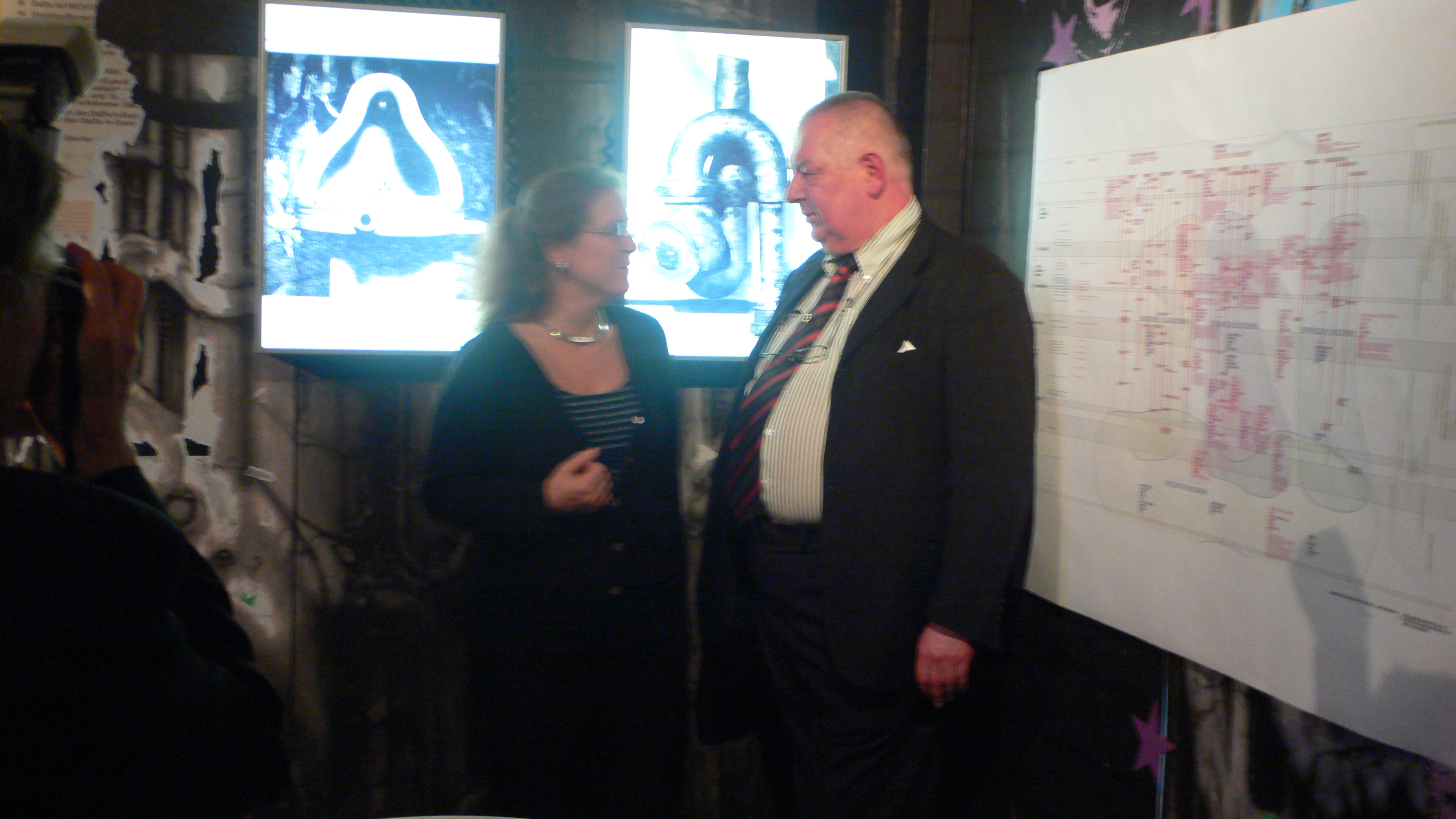 Präsentation der Nr. 1 im Jahre 7, Cabaret Voltaire, und Seine Majestät König Kraska, Herrscher über das Zen- und A-Zentrische Weltreich.